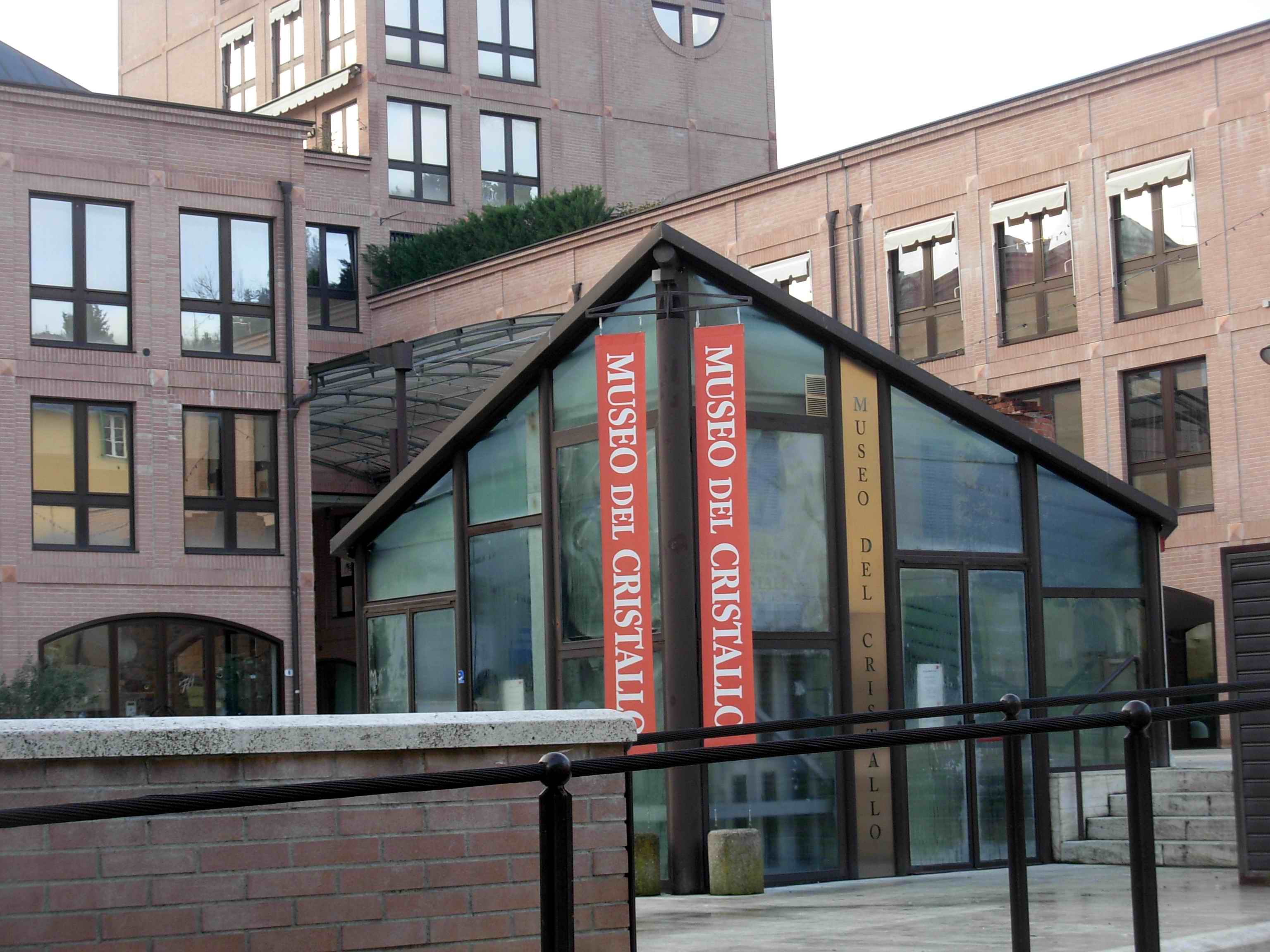 Colle di Val d'Elsa (Siena - Italia): il Museo del Cristallo